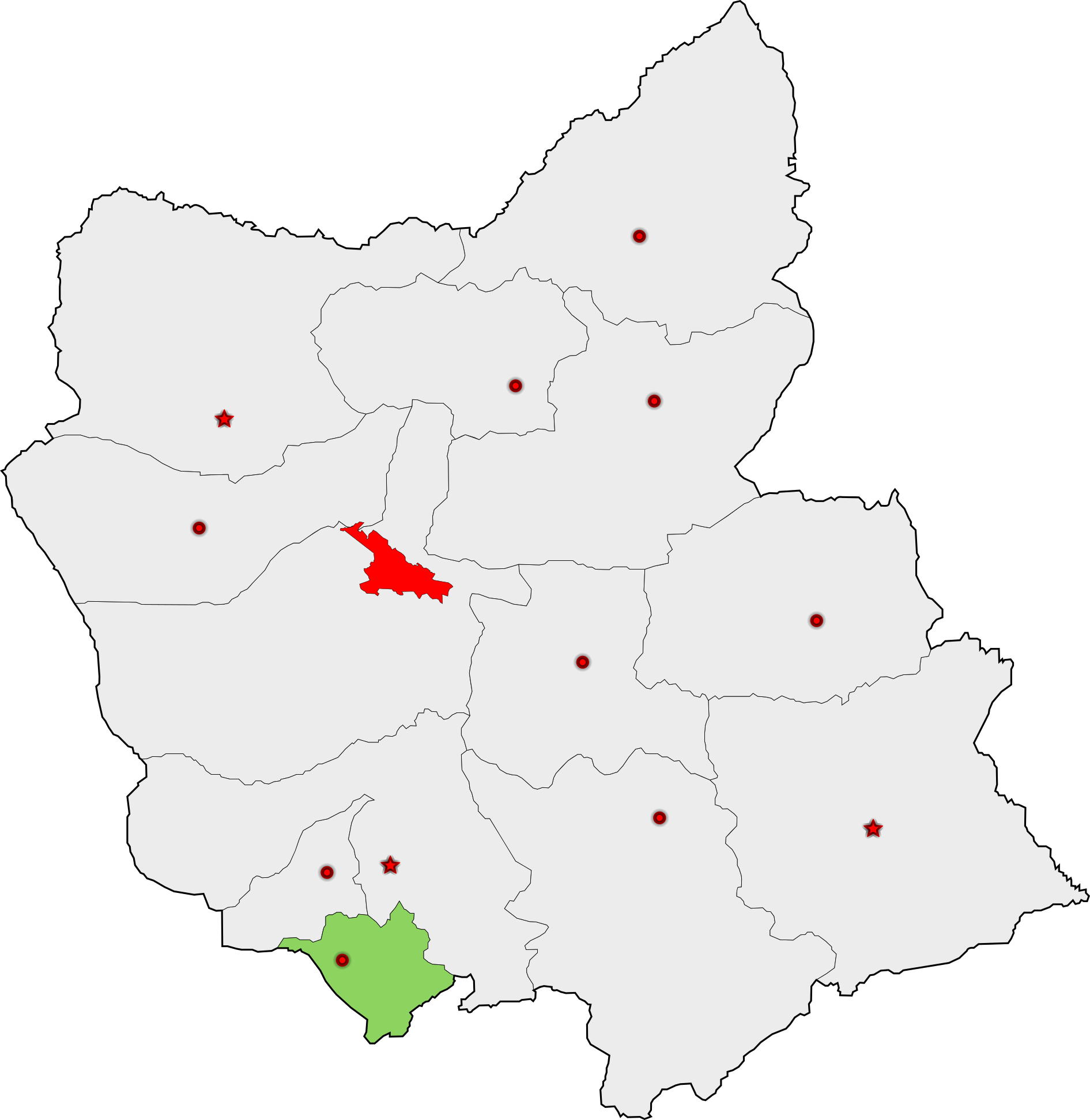 حوزهٔ انتخاباتی ملکان برای انتخابات مجلس شورای اسلامی